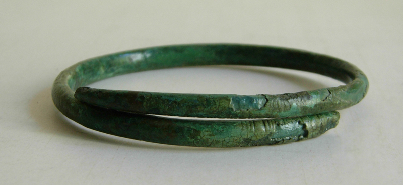 Armilla in verga di bronzo; la sezione biconvessa tende ad assottigliarsi verso i capi. Nella Cultura di Golasecca le armille a capi sovapposti sono caratteristiche dei corredi maschili, mentre quelle a capi aperti dei corredi femminili.